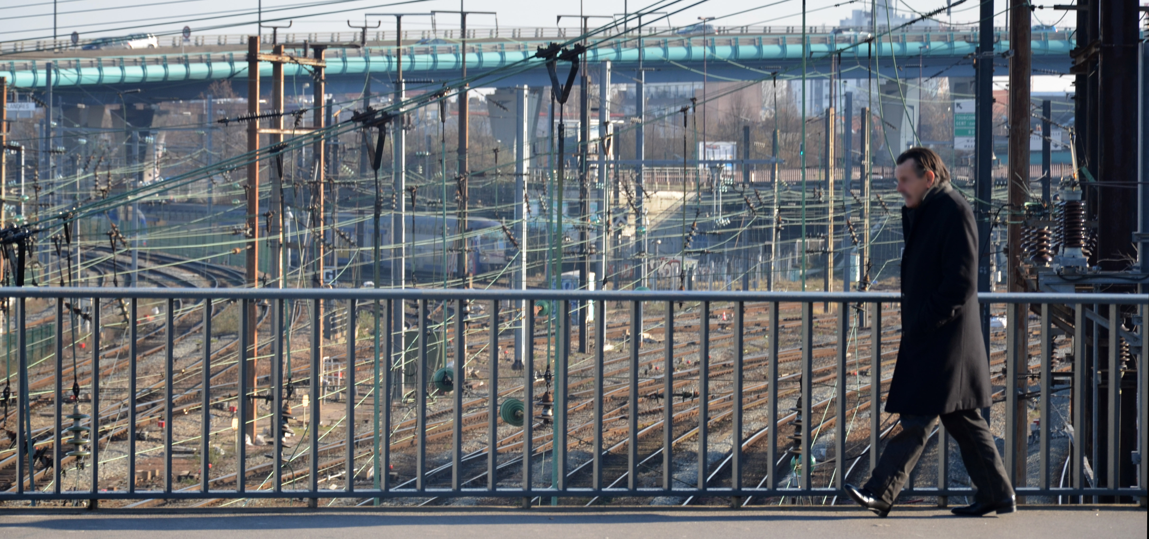 Paysage intra-urbain (avec voie routière urbaine - Périphérique de Lille) surélevée) et voies ferrées situé à l'arrière de la Gare SNCF de Lille-Flandres (février 2015)